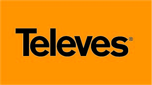 Логотип Televes